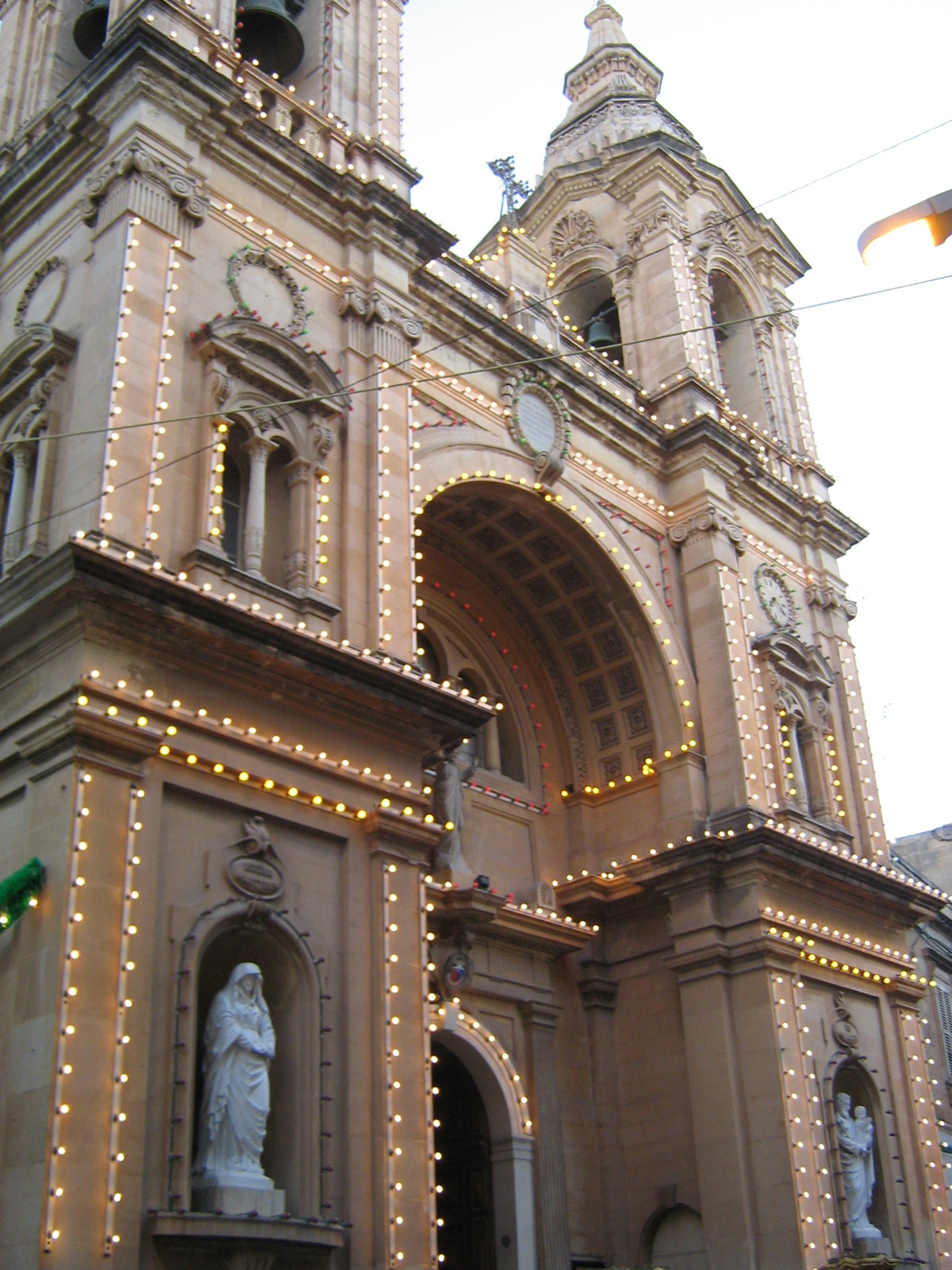 Parroquia de Nuestra Señora de la Estrella del Mar, Sliema.